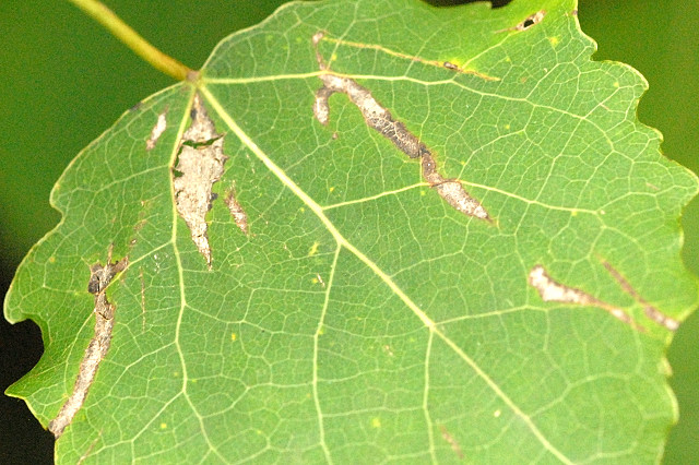 Stigmella assimilella from Commanster, Belgian High Ardennes .